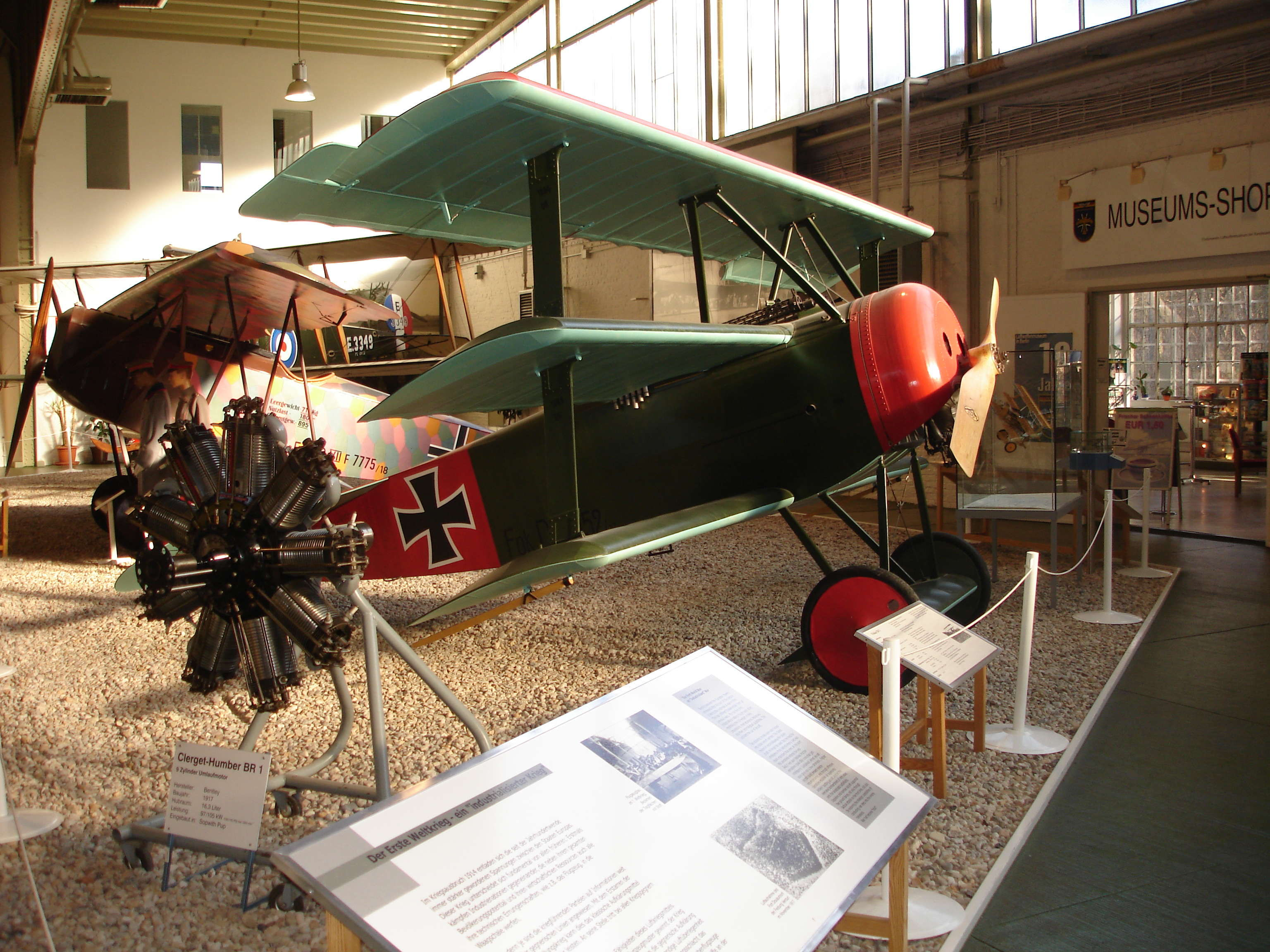 Fokker Dr.I at the Luftwaffenmuseum in Berlin-Gatow